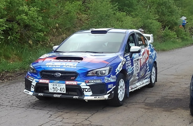 2019年ラリーモントレーJN1クラスにて、新井敏弘がドライブするスバル・WRX STI